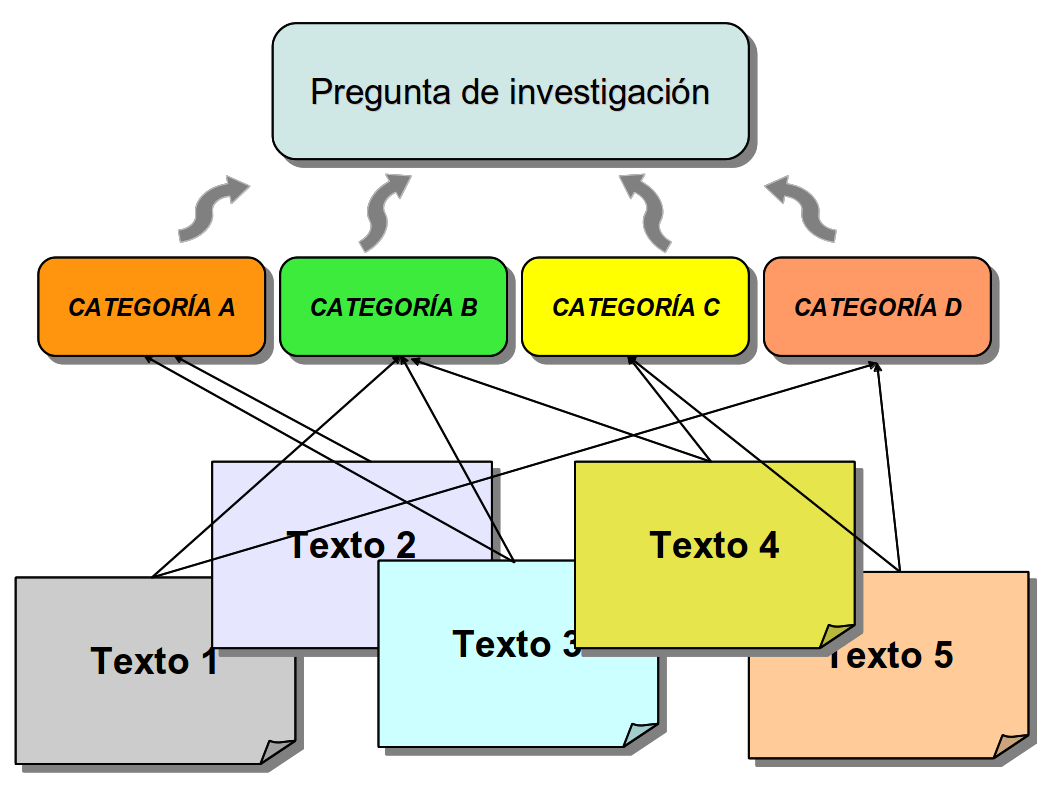 Análise de contido. Categorización.